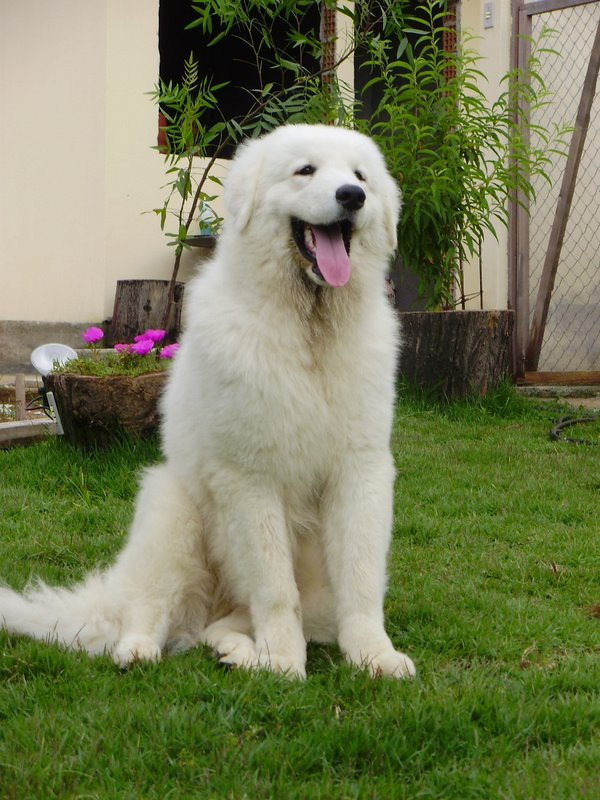 Kuvasz Prince Juninho Poster